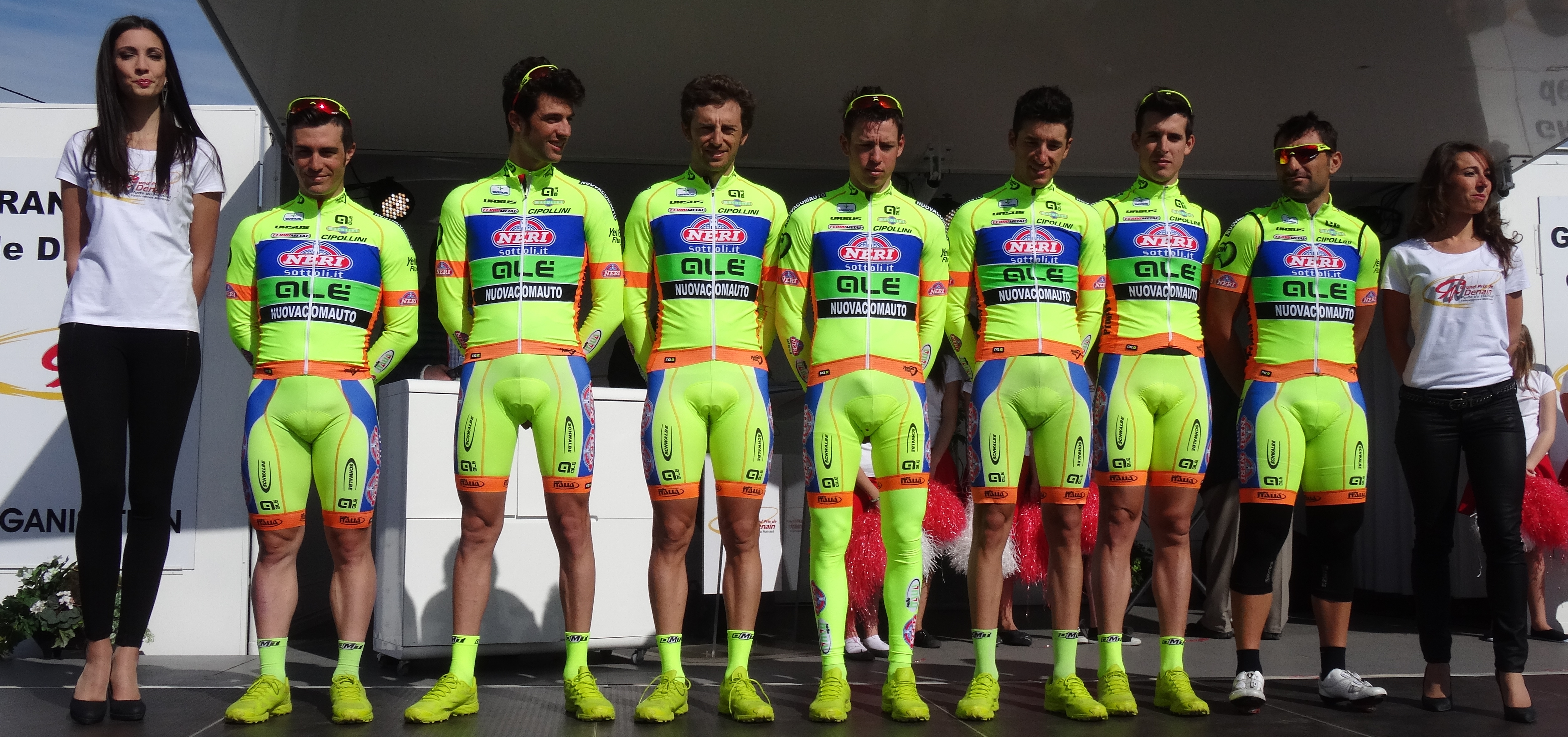 Reportage réalisé le jeudi 17 avril à l'occasion du départ et de l'arrivée du Grand Prix de Denain 2014 à Denain, Nord, Nord-Pas-de-Calais, France.